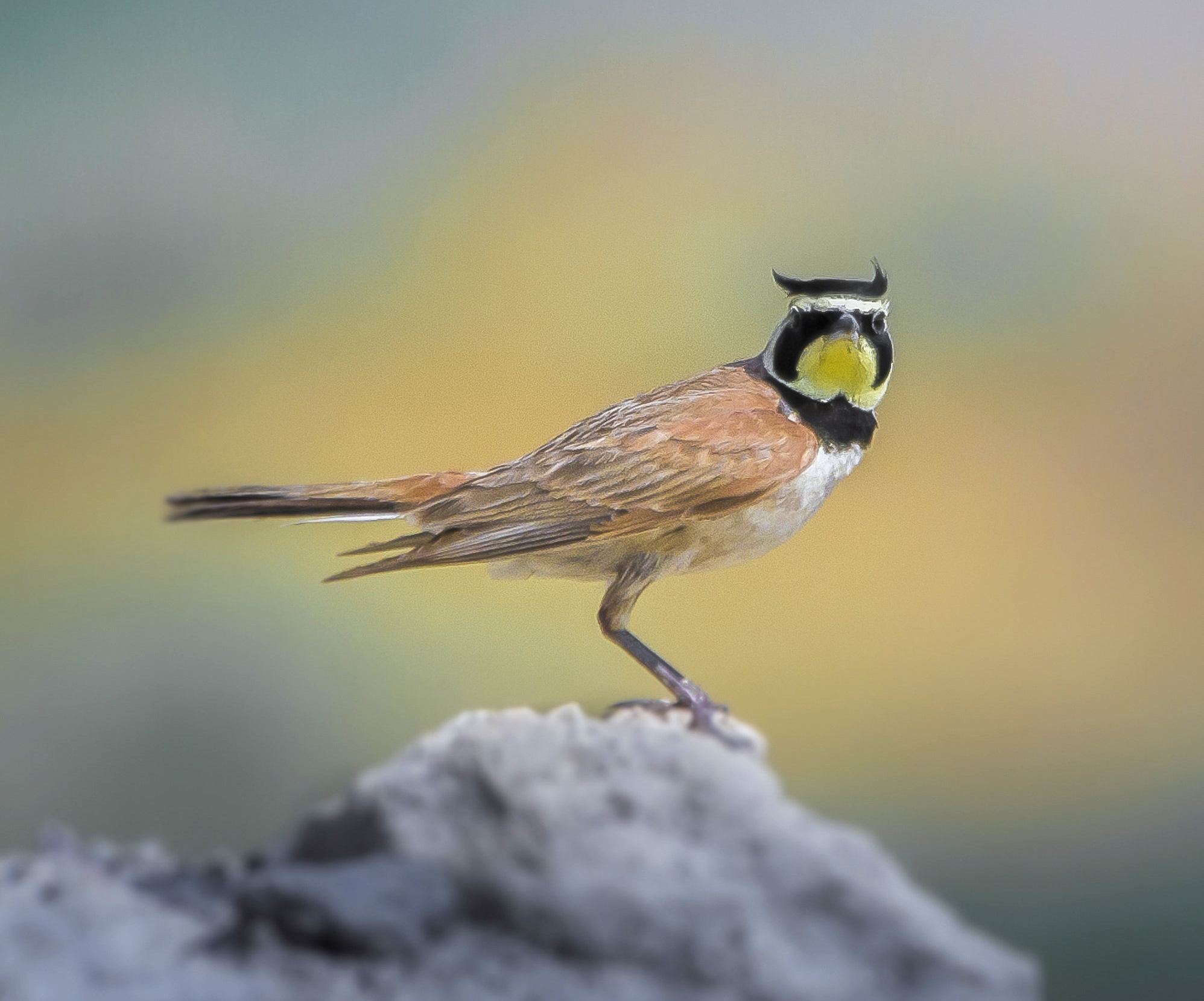 500px provided description: Eremophila alpestris [#birds ,#natural ,#aves]